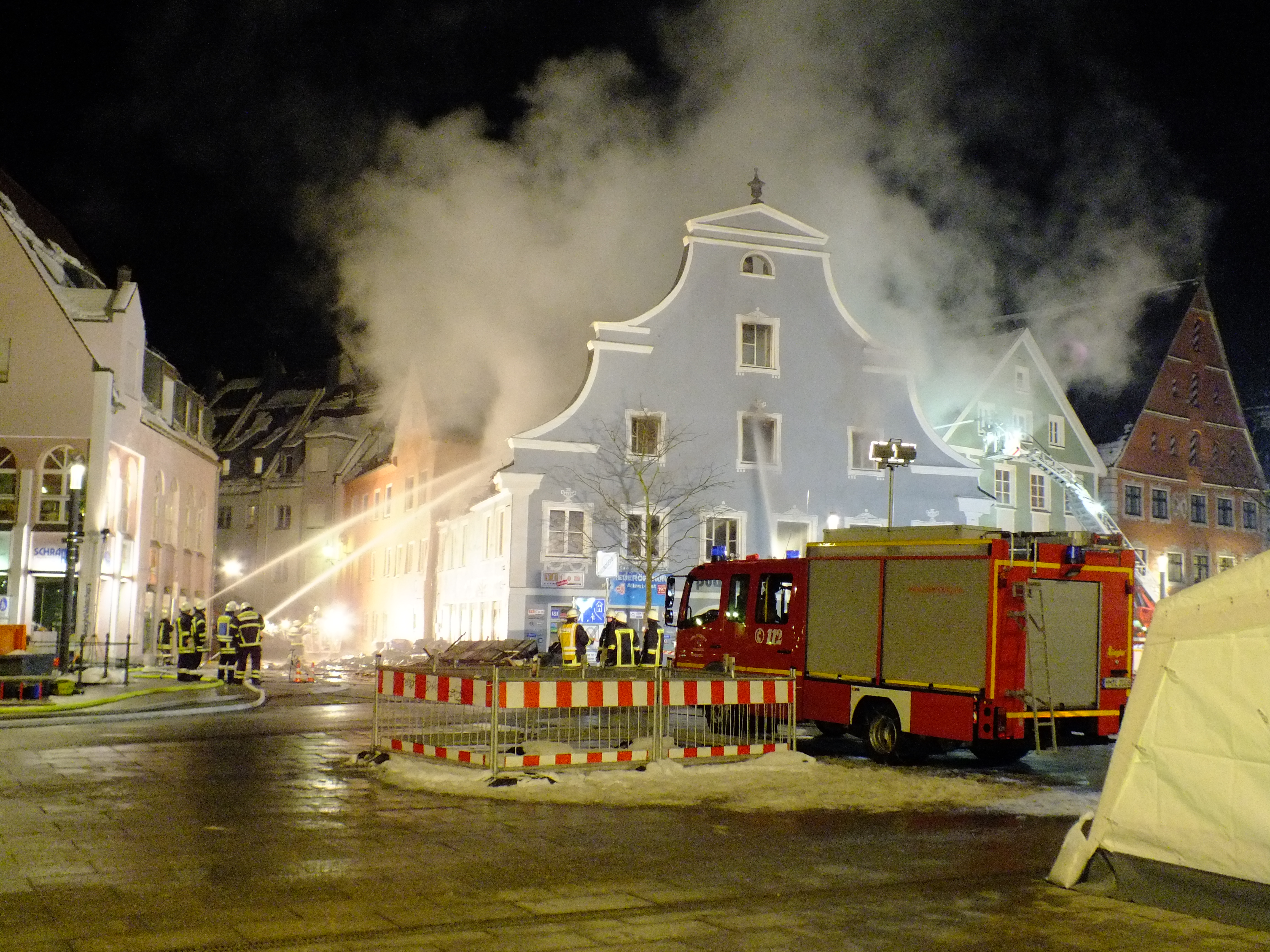 Gasthaus zum Raben in Memmingen, Brand am 23. Januar 2013, Löschversuche der Feuerwehr über 14 Stunden nach Ausbruch des Brandes.